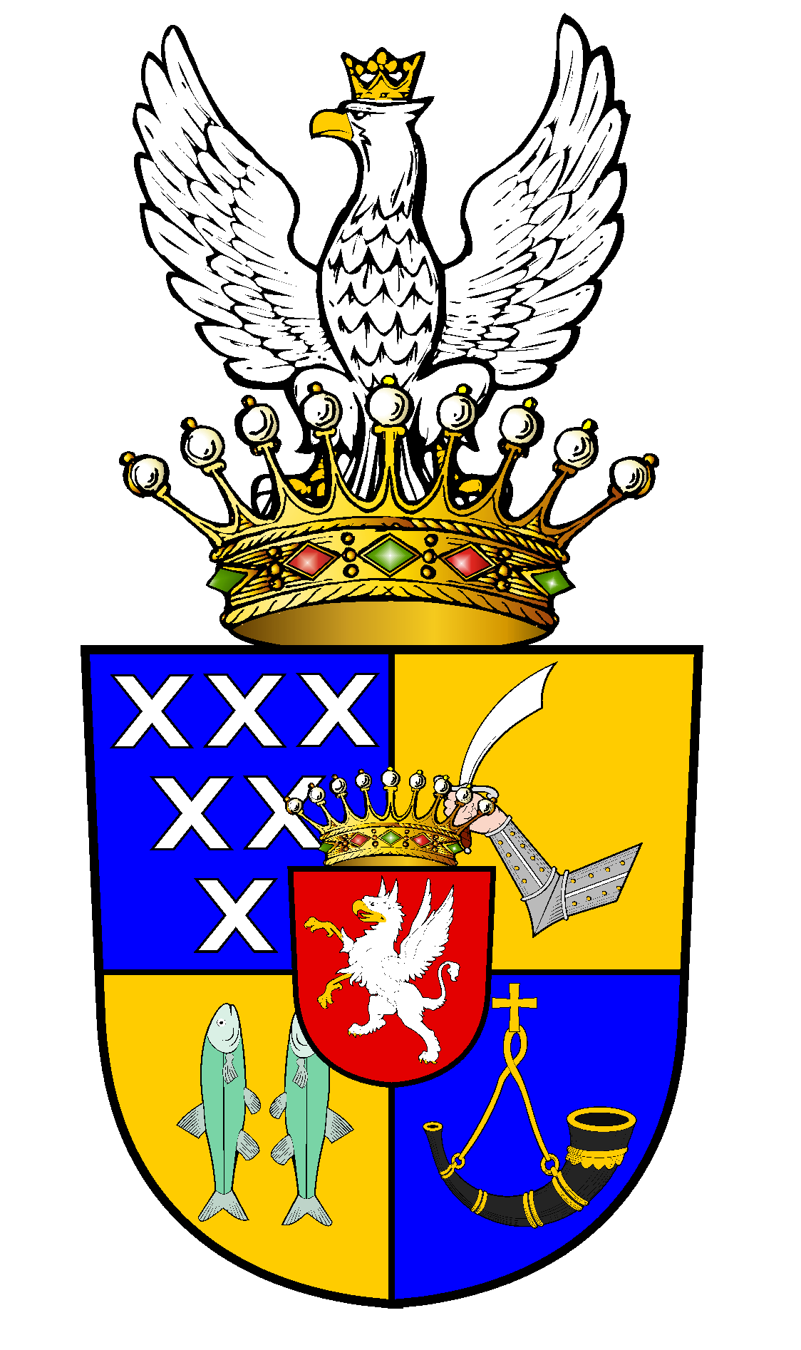 Herb hrabiów Ronikierów (uproszczony) wg. "J. Ostrowski "Księga herbowa rodów polskich"